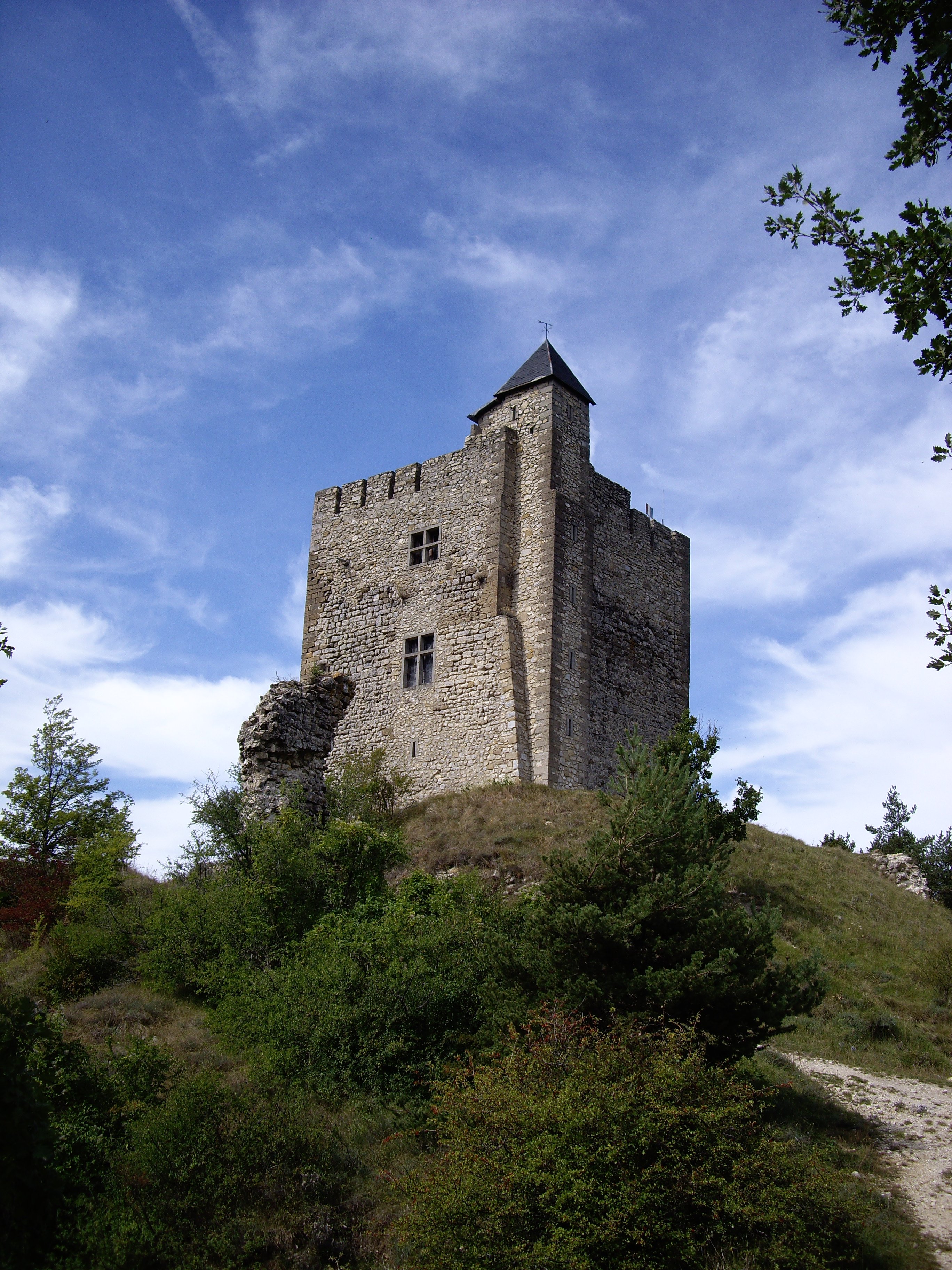 Petite tour féodal située au sommet d'une colline à proximité du village de Barcelonne dans la Drôme